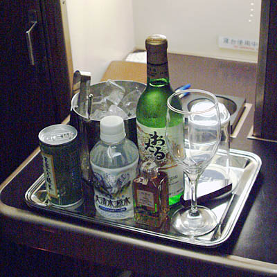 北斗星ロイヤルで提供されるミニバーセット